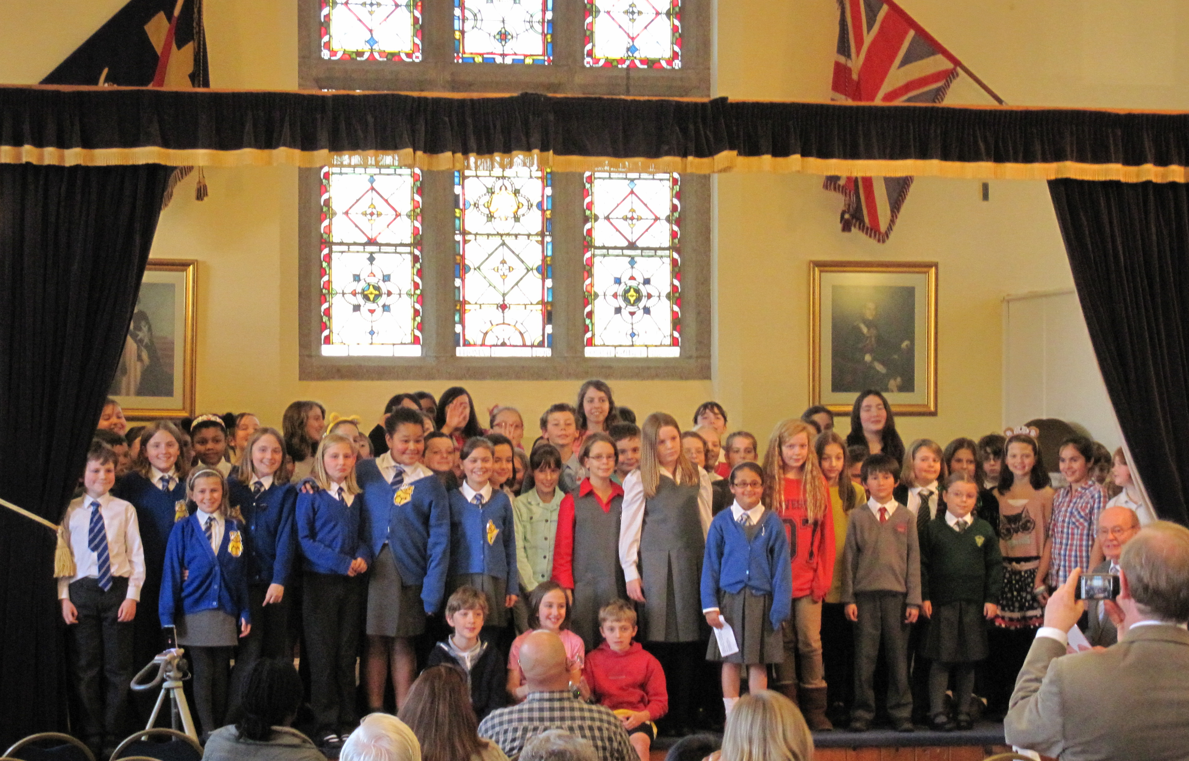 Nrf: Journées Jèrriaises dé l'Eisteddfod dé Jèrri, Novembre 2011